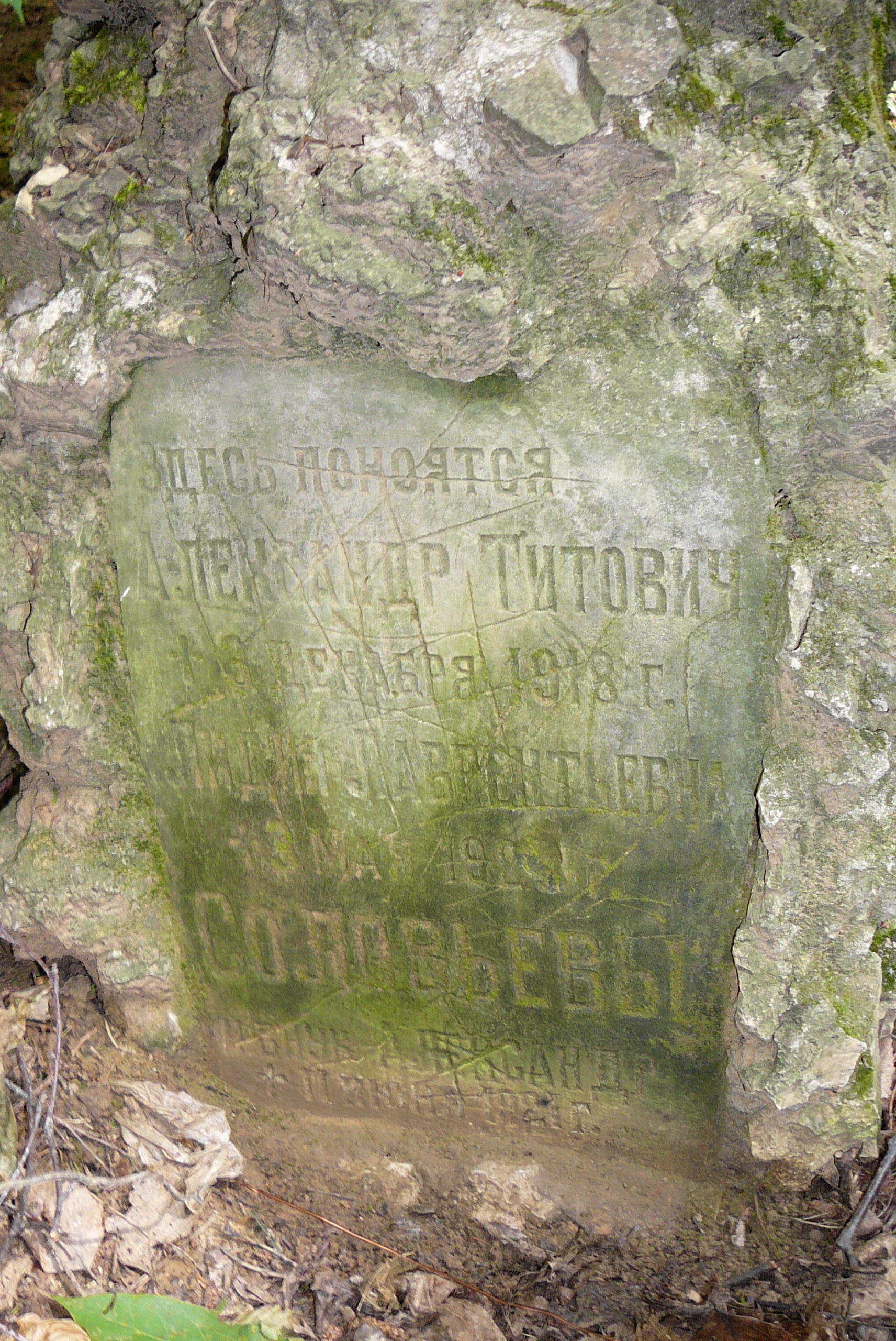 Общее надгробие А.Т.Соловьева и его родственников на Арском кладбище в г. Казани